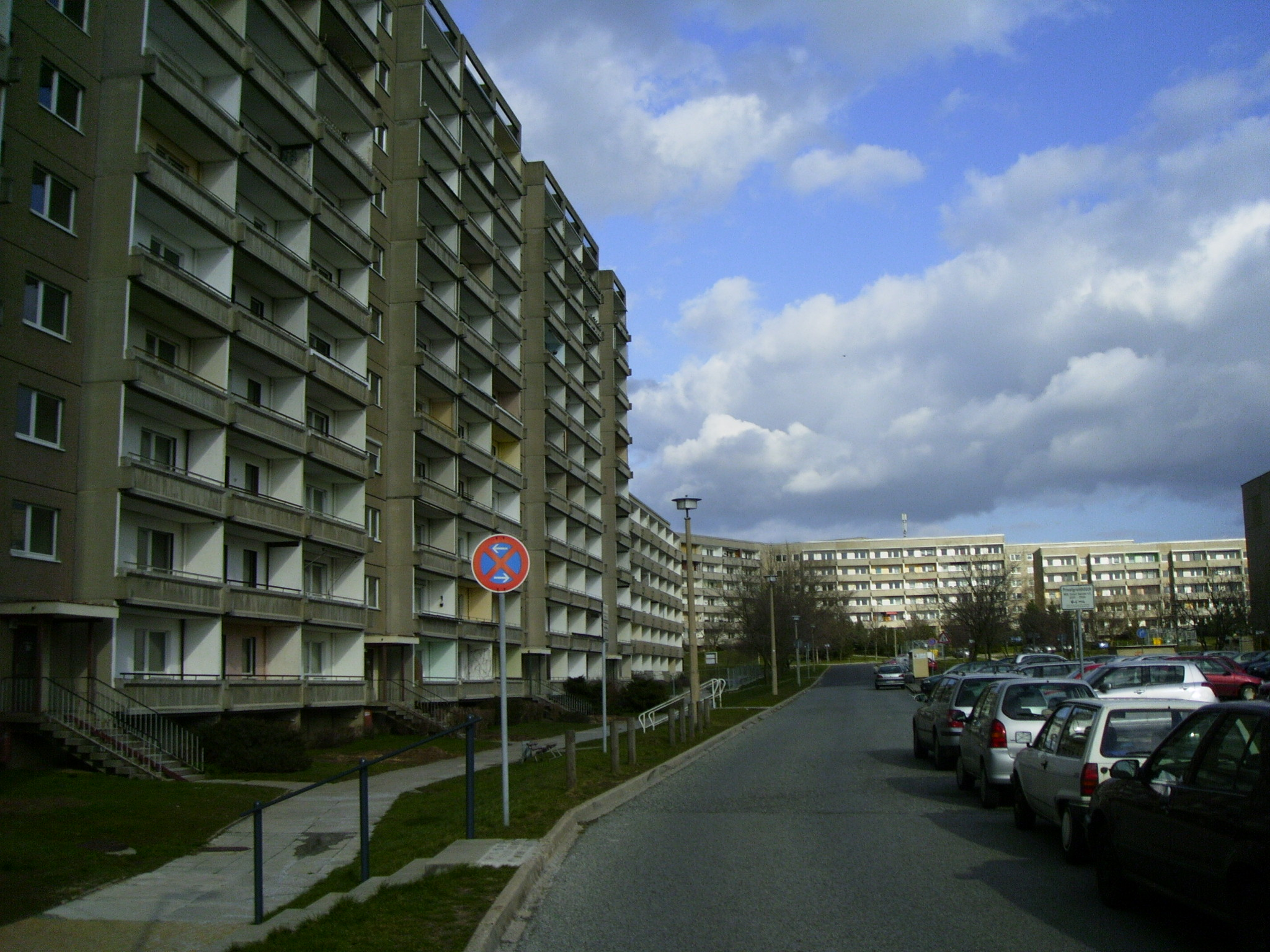 Houses of Bautzens district "Gesundbrunnen".